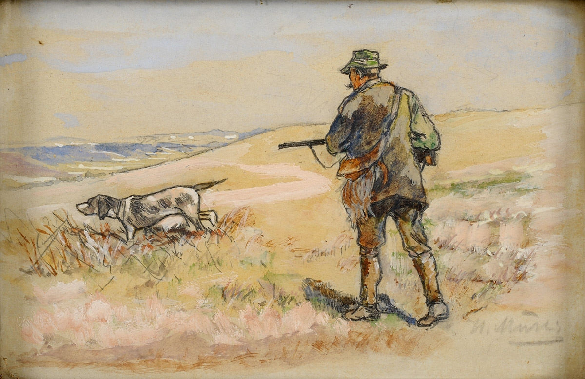 Jäger mit Hund. Signiert. 18 x 12,5 cm